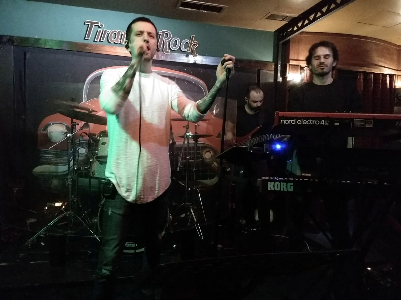 Eugent Bushpepa performing at Tirana Rock